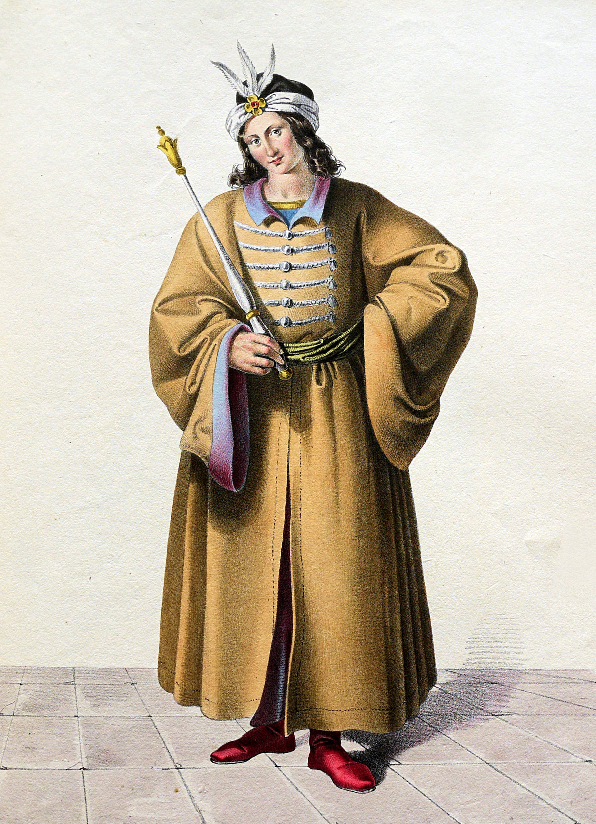 Ladislaus II. (1131-1163König von Ungarn etc. Lithographie von Josef Kriehuber nach einer Zeichnung von Moritz von Schwind aus Ungerns Erste Heerführer Herzoge und Koenige In einer Reihe von Bildnissen von Bela bis auf Seine Majestät Franz I. Kaiser Von Österreich König Von Ungern &c., &c. Wien : Lithographisches Institut ;ca. 1828.